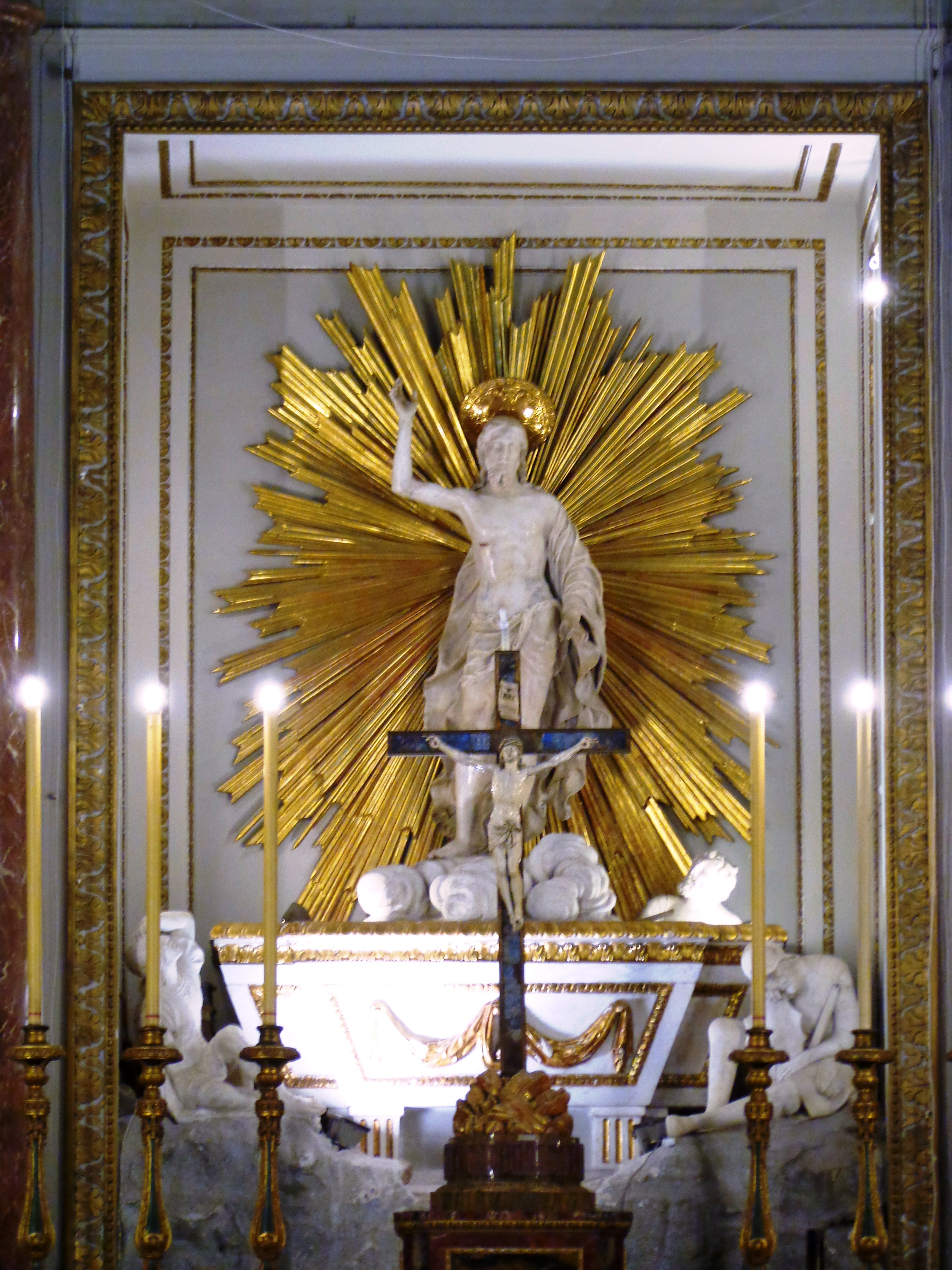 Cattedrale_PA_07